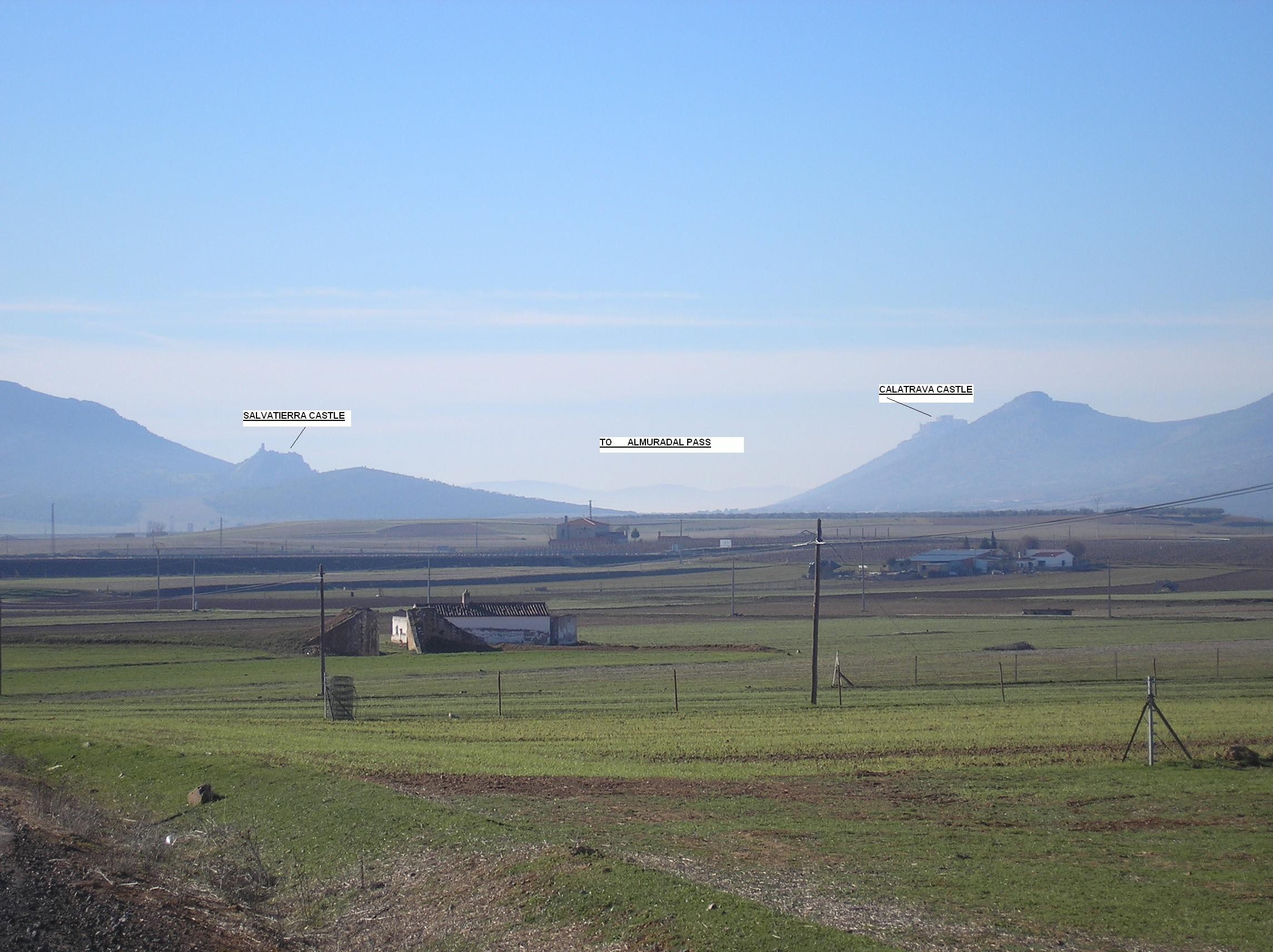 taken by Valdoria 2006